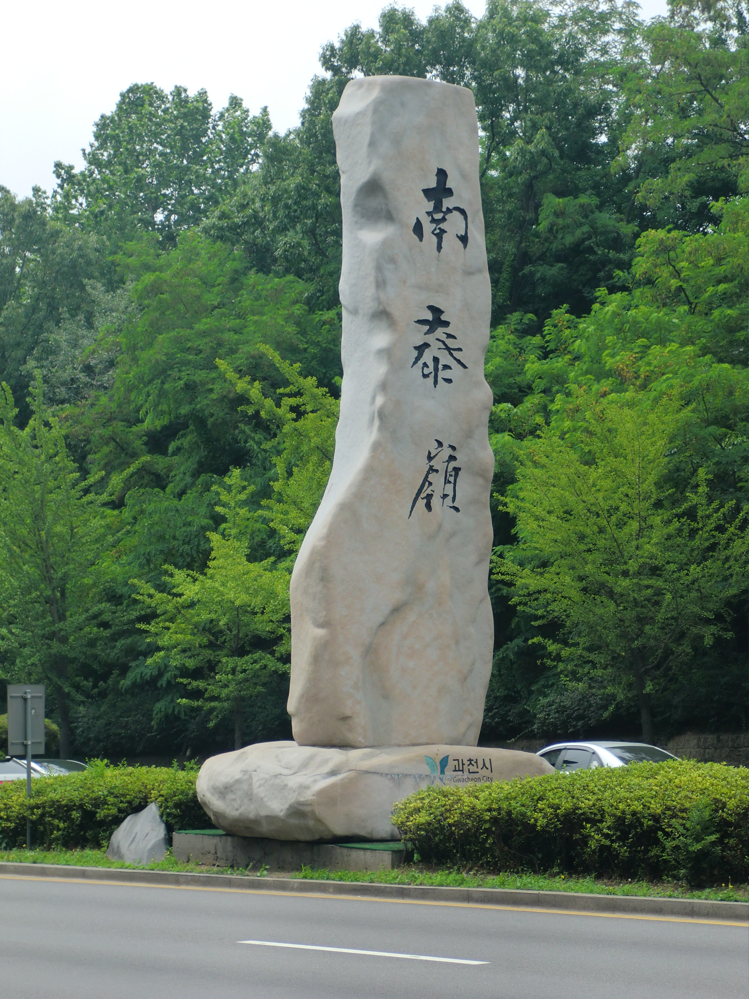 경기도 과천시에 있는 남태령비